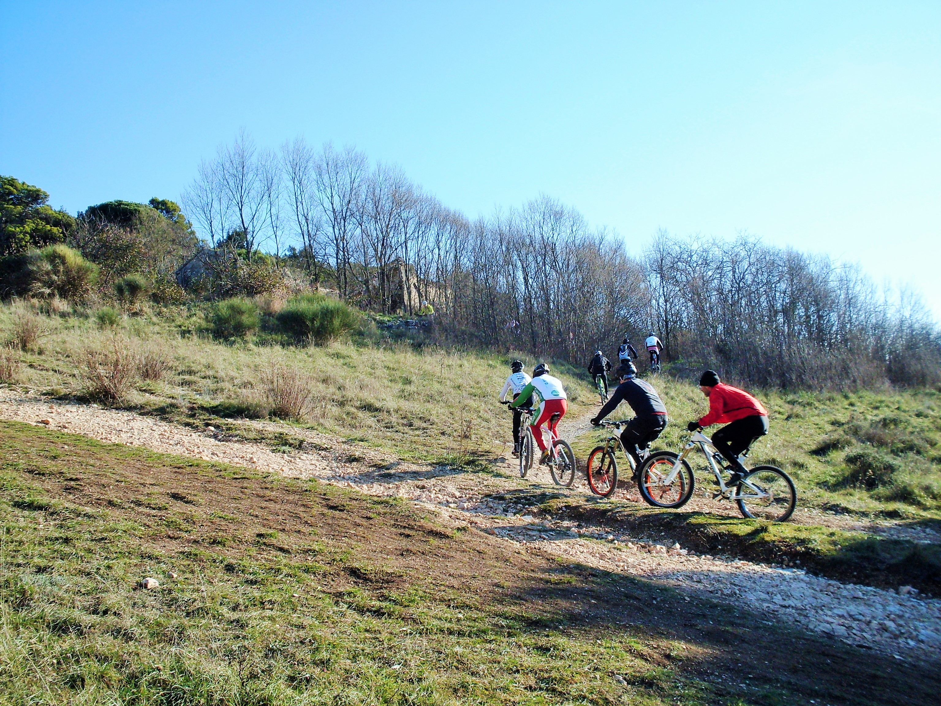 Monte Conero ciclisti sopra Pian di Raggetti